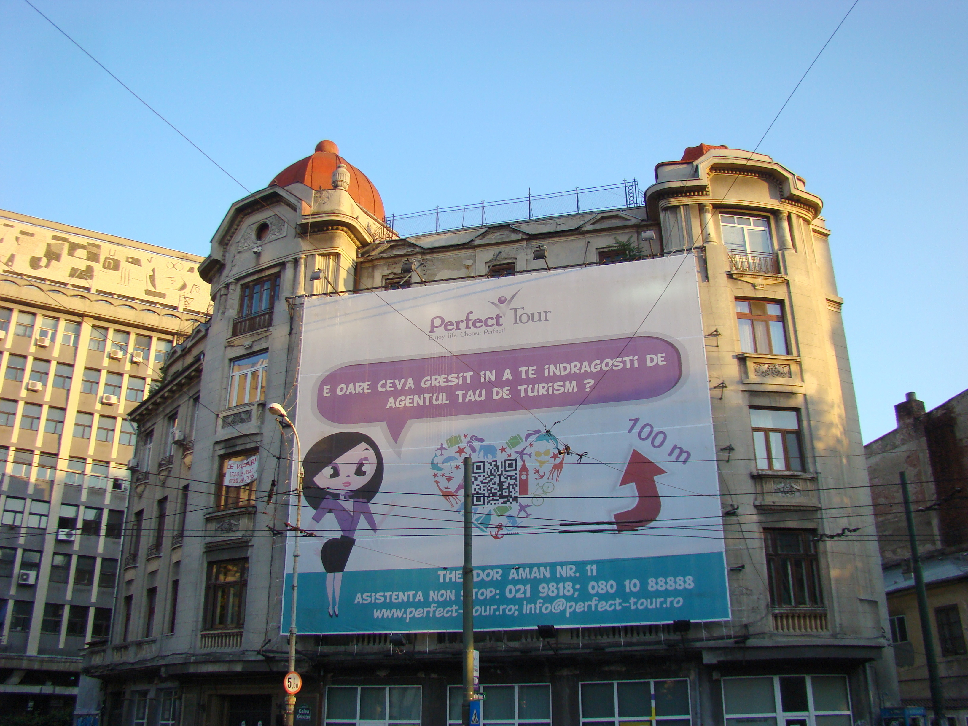 Casă monument istoric, Calea Griviței, nr.21